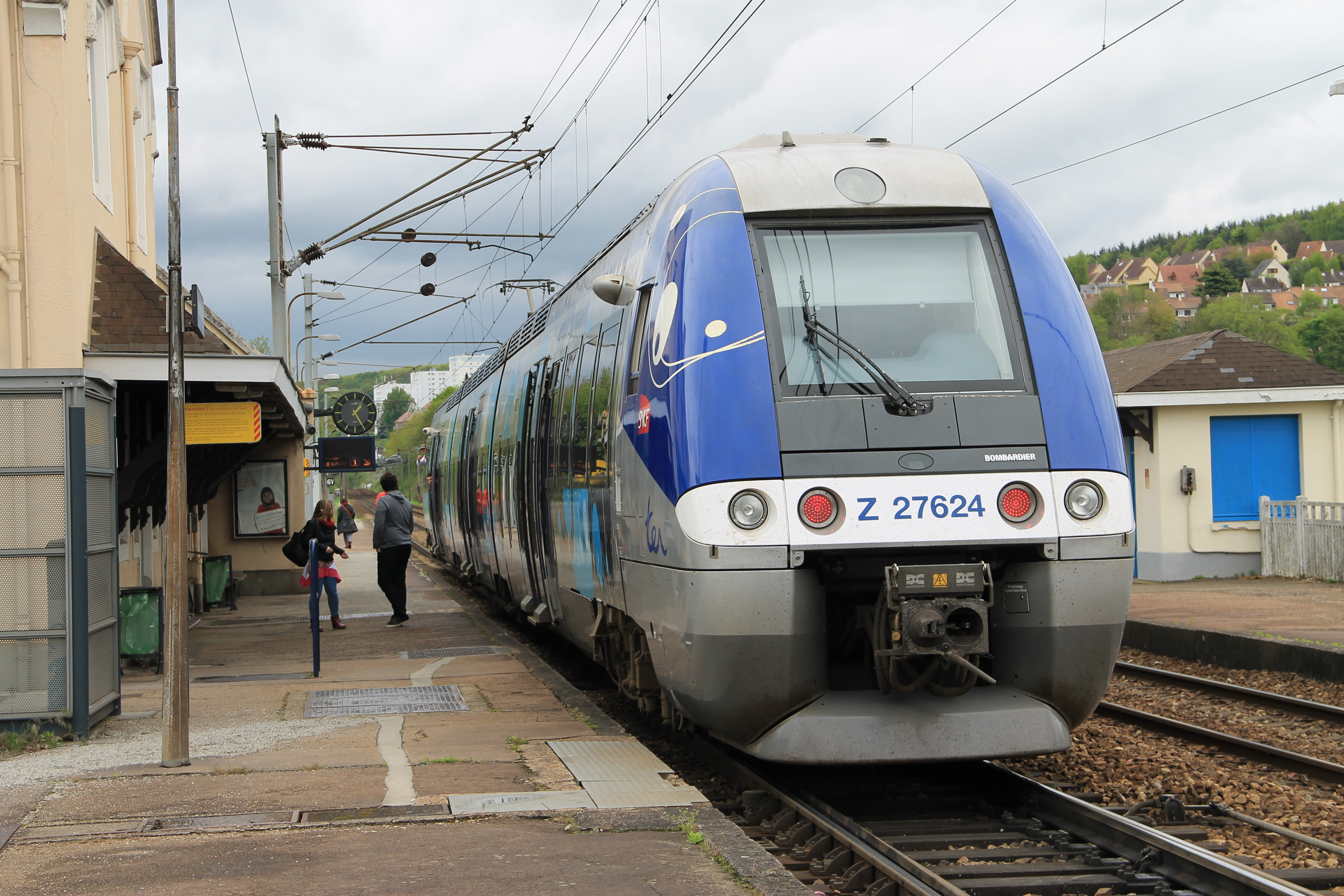 Arrêt d'un TER Yvetôt-Elbeuf-Saint-Aubin en gare de Maromme, Seine-Maritime, France.